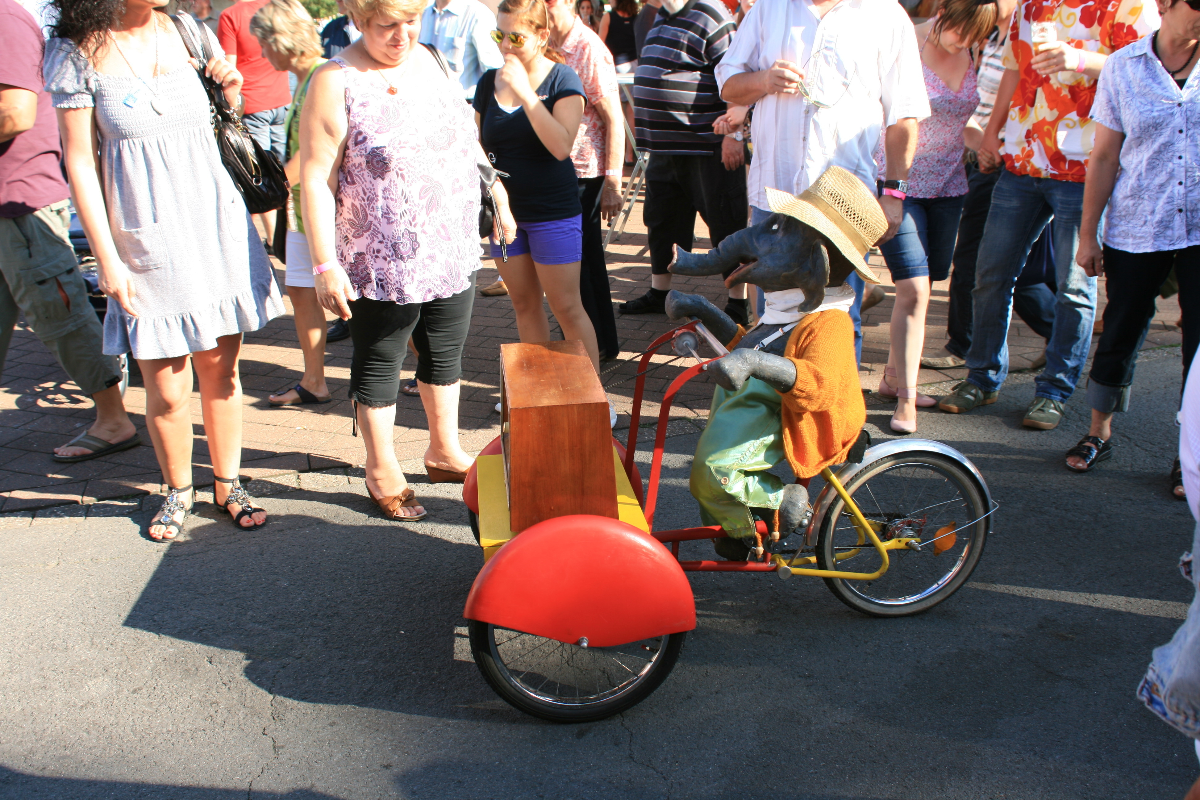 Hafenstraße beim Kanalfestival 2011 in Datteln